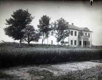 Будівля Козаровицької дослідно-меліоративної лукової станції, 1950-ті роки. Фотографія з архіву онуки Шкабари Олексія Степановича, керівника станції з 1925-го року, - Тетяни Свербілової.